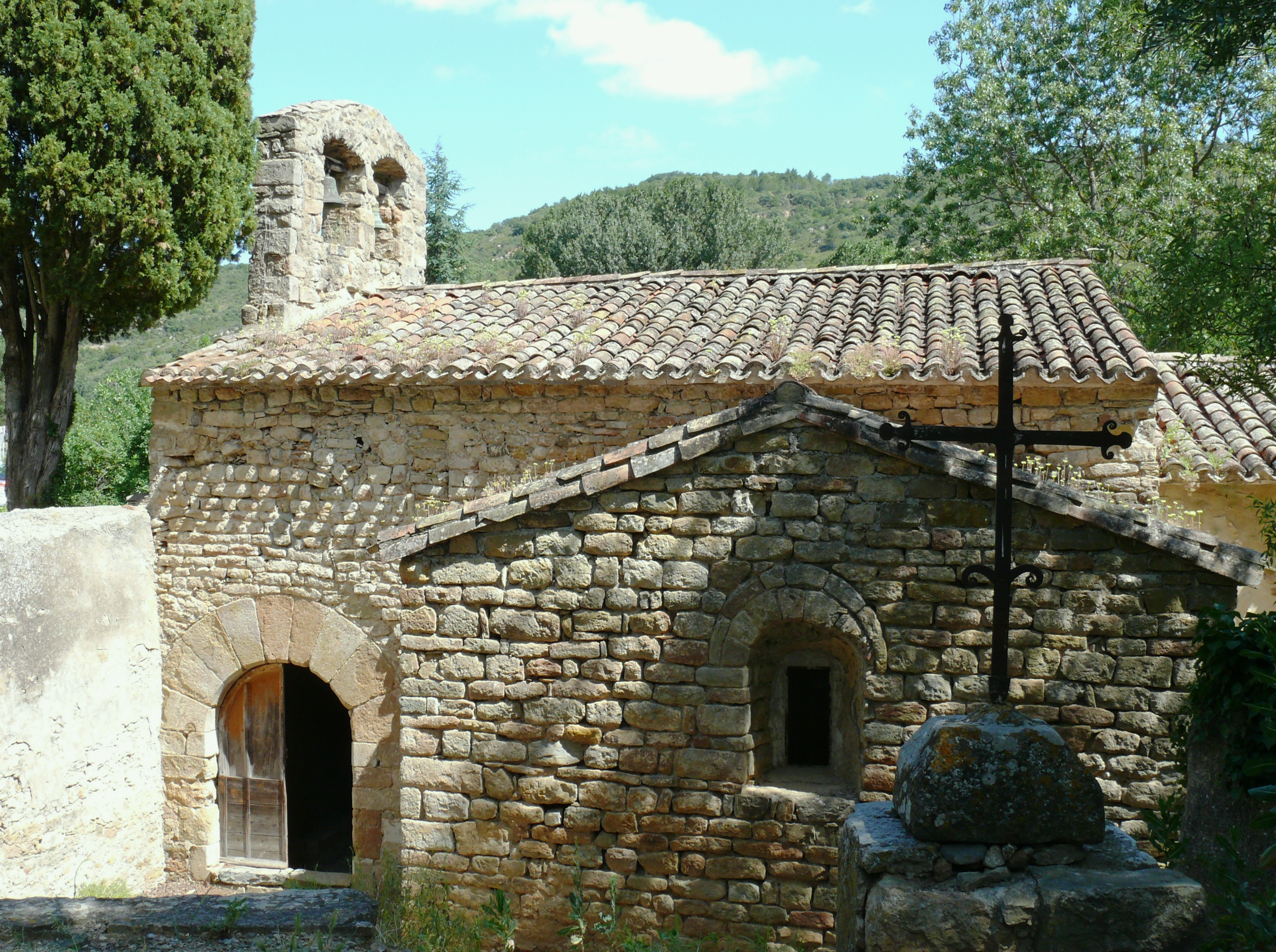 Saint-Martin-des-Puits - Eglise Saint-Martin